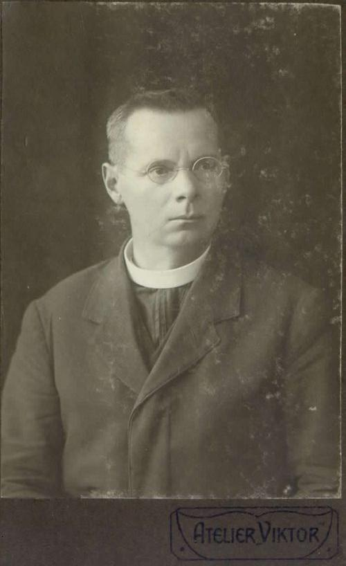 Franc Avsec